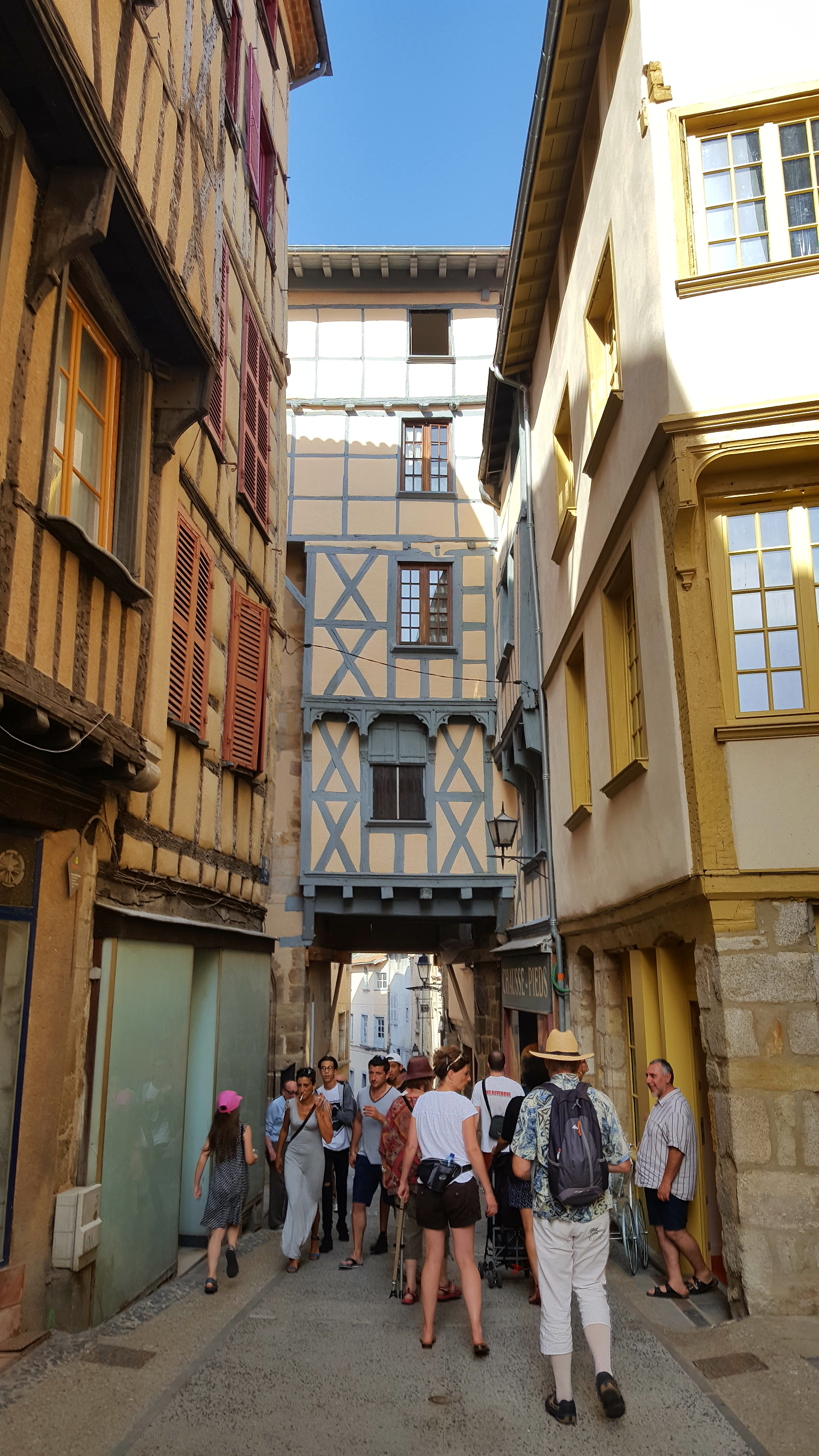 Maisons médiévales à Thiers